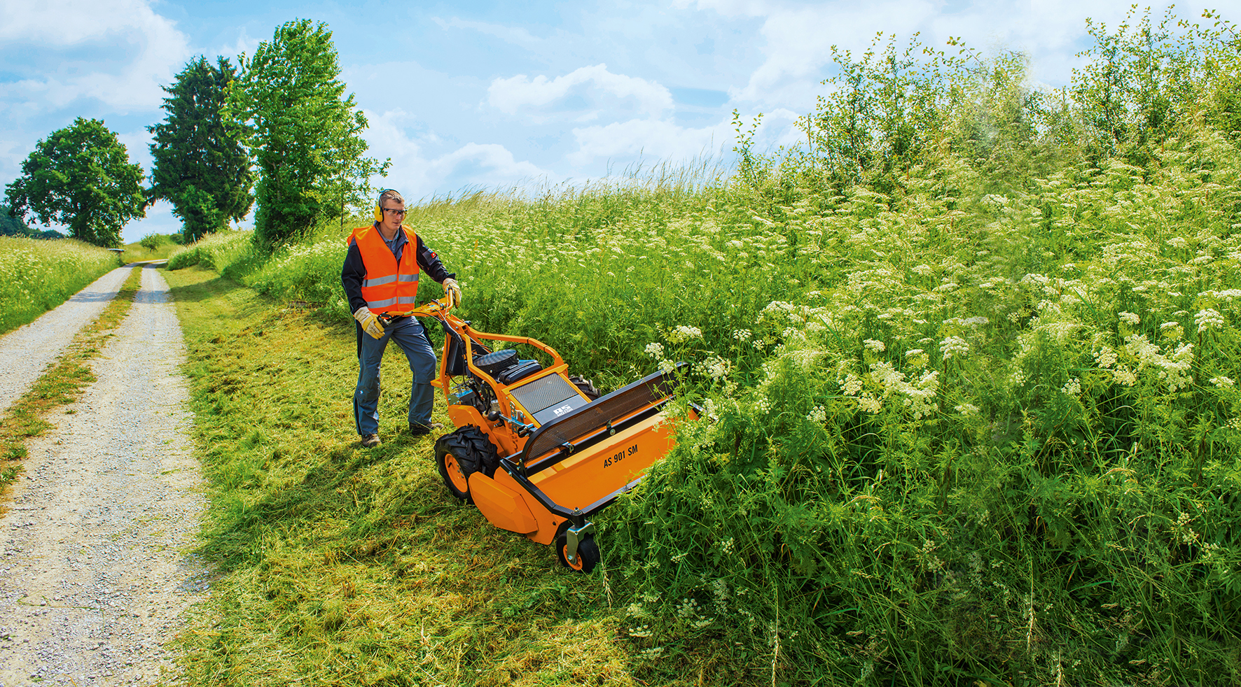 Handgeführter Profi-Schlegelmäher AS 901 SM von AS-Motor. Tags: Schlegelmäher, handgeführt, Profi-Maschine am Hang, robustes Schlegelmähwerk